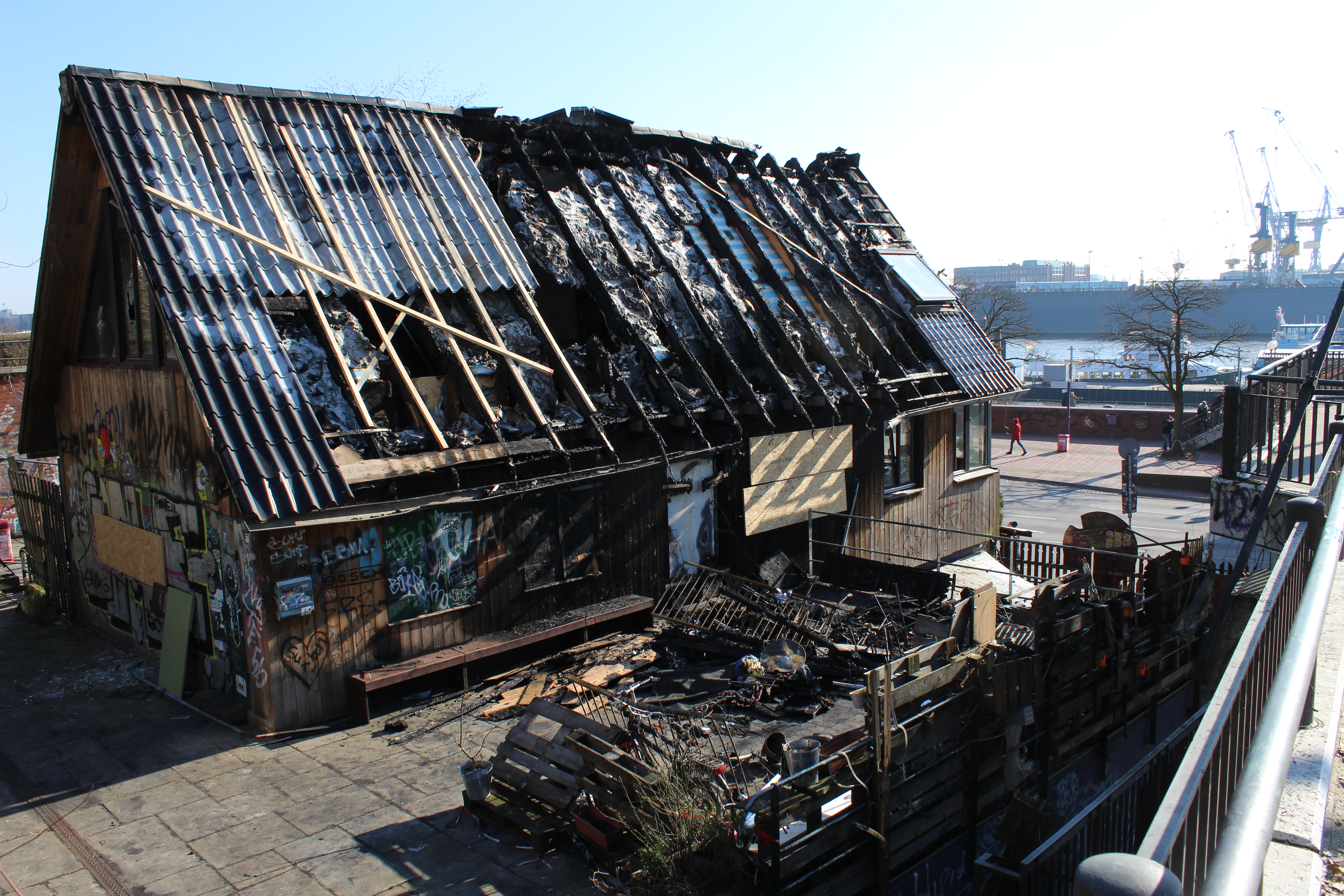 Golden Pudel Club nach dem Brand vom 15.2.2016